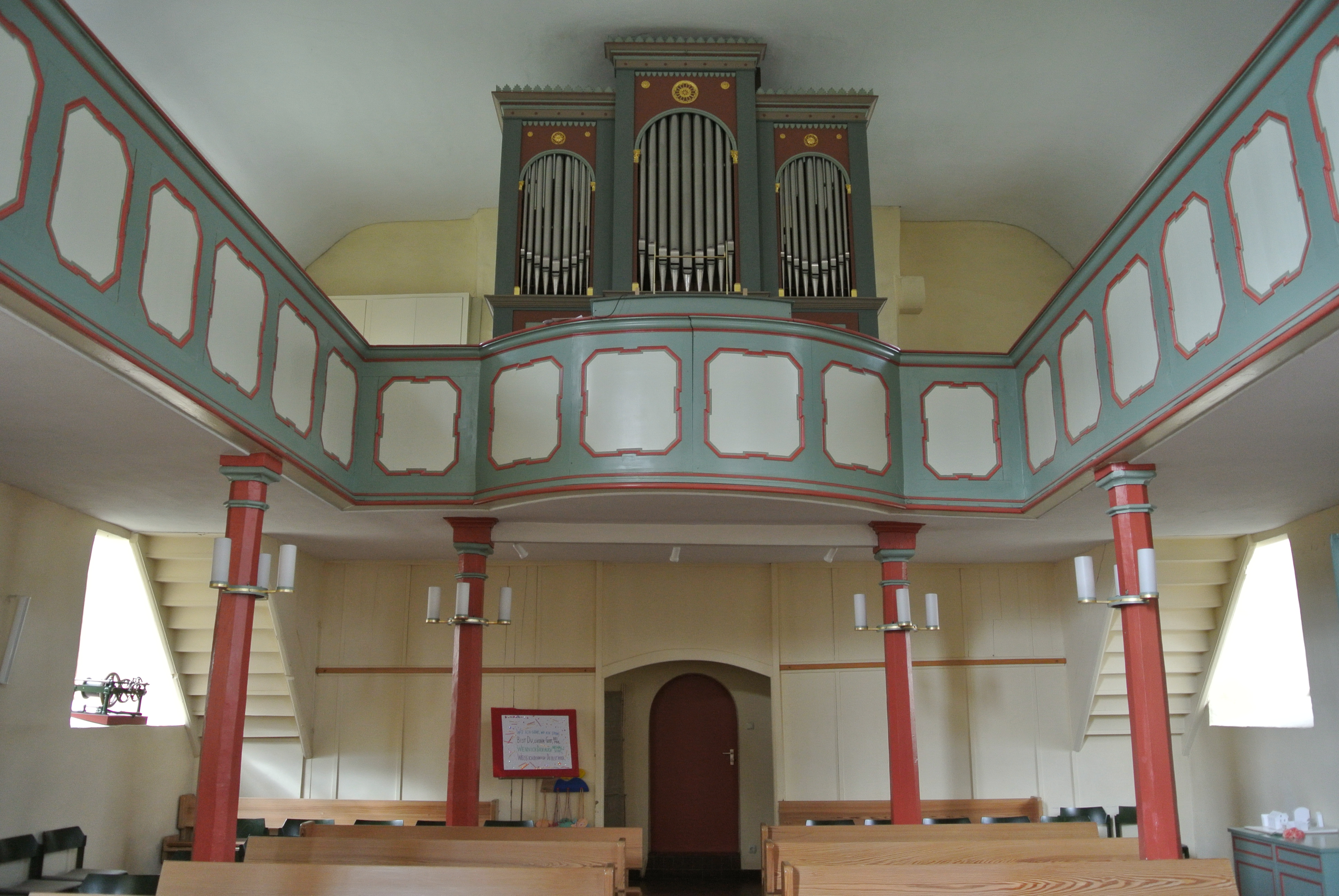 Evangelische Pfarrkirche in Frankfurt Nieder-Eschbach, Deuil-La-Barre-Straße 74; Bauzeiten 1617-1618, 1765-1766, 1965-1966; Baumeister: Konrad Roßbach und Christian Ludwig Hermann; Baudenkmal; Innenraum Orgelempore